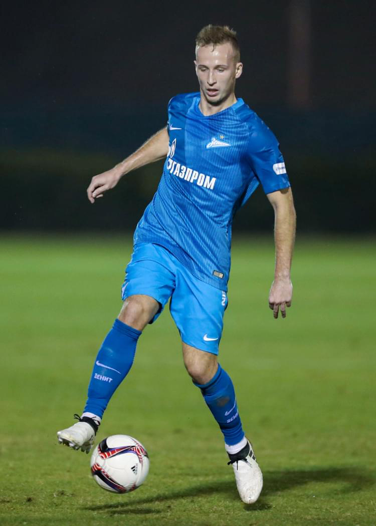 16.01.2017. Объединенные Арабские Эмираты, Дубай. «Газпром»-тренировочные сборы в Дубае: 16 января, контрольный матч «Зенит» — «Чанчунь Ятай».